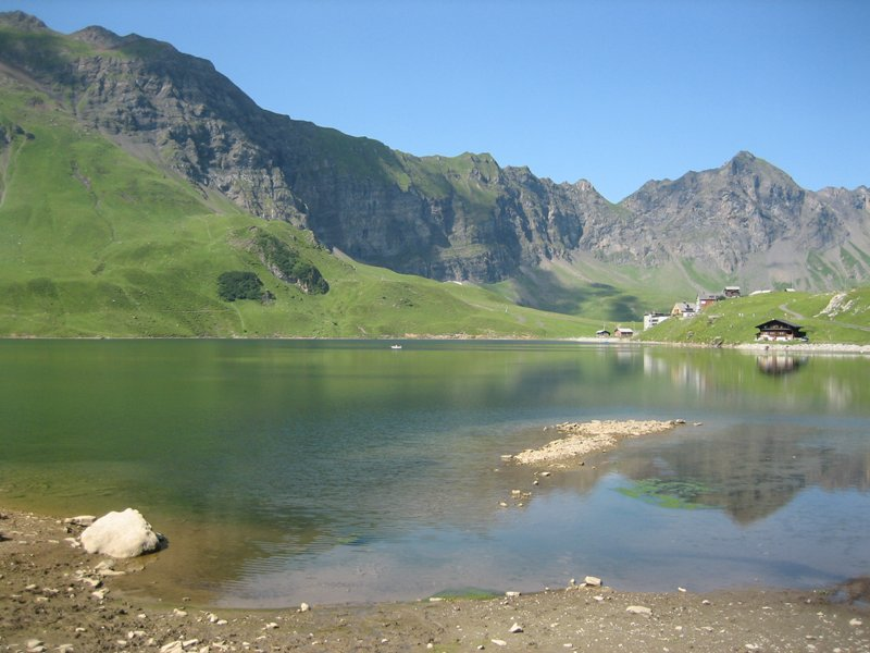 Melchsee im Kt. OW / Schweiz